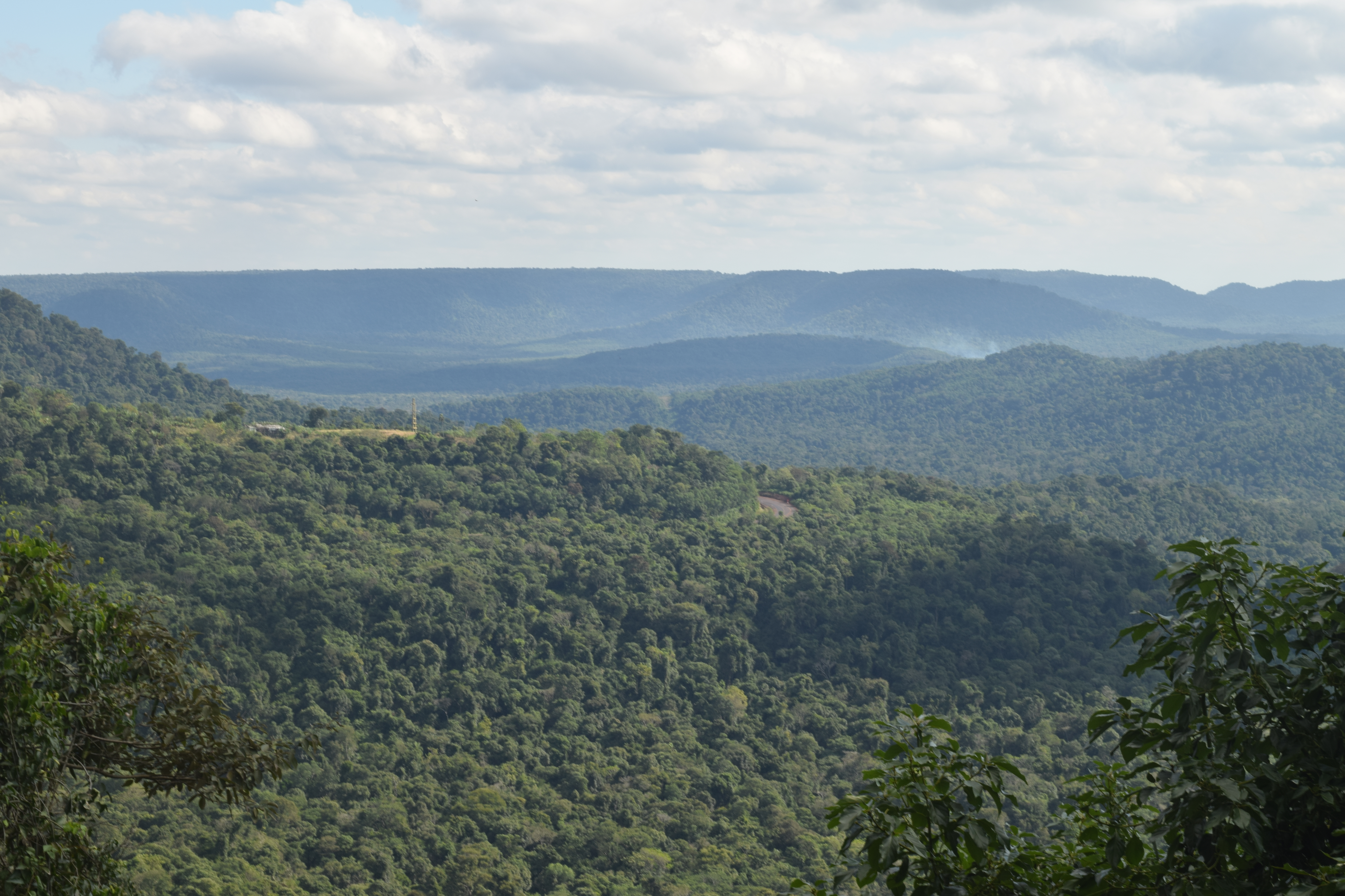 El Parque provincial Salto Encantado visto desde la ruta provincial 7.